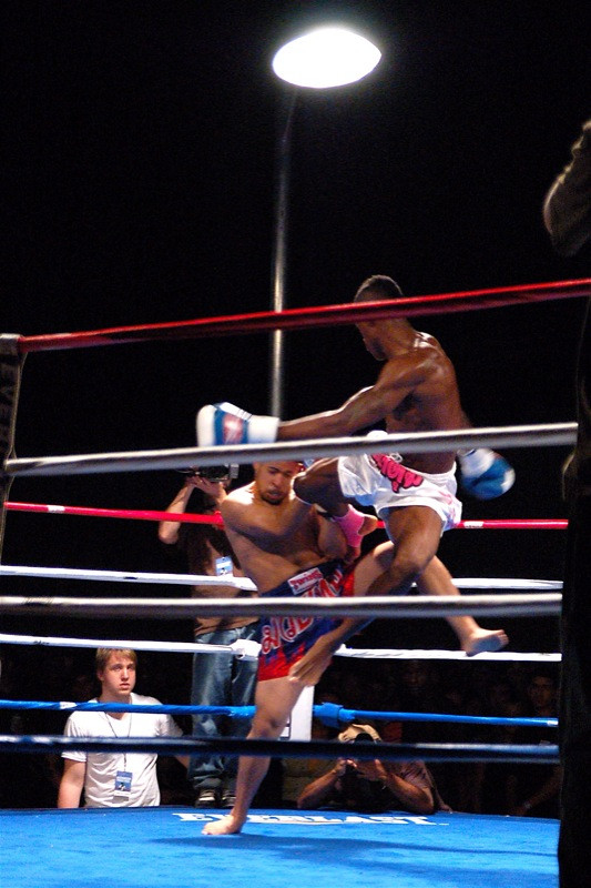 Muay Thai. Elijah's Flying KO.